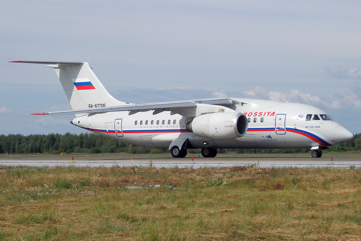 Rossiya, RA-61706, Antonov An-148